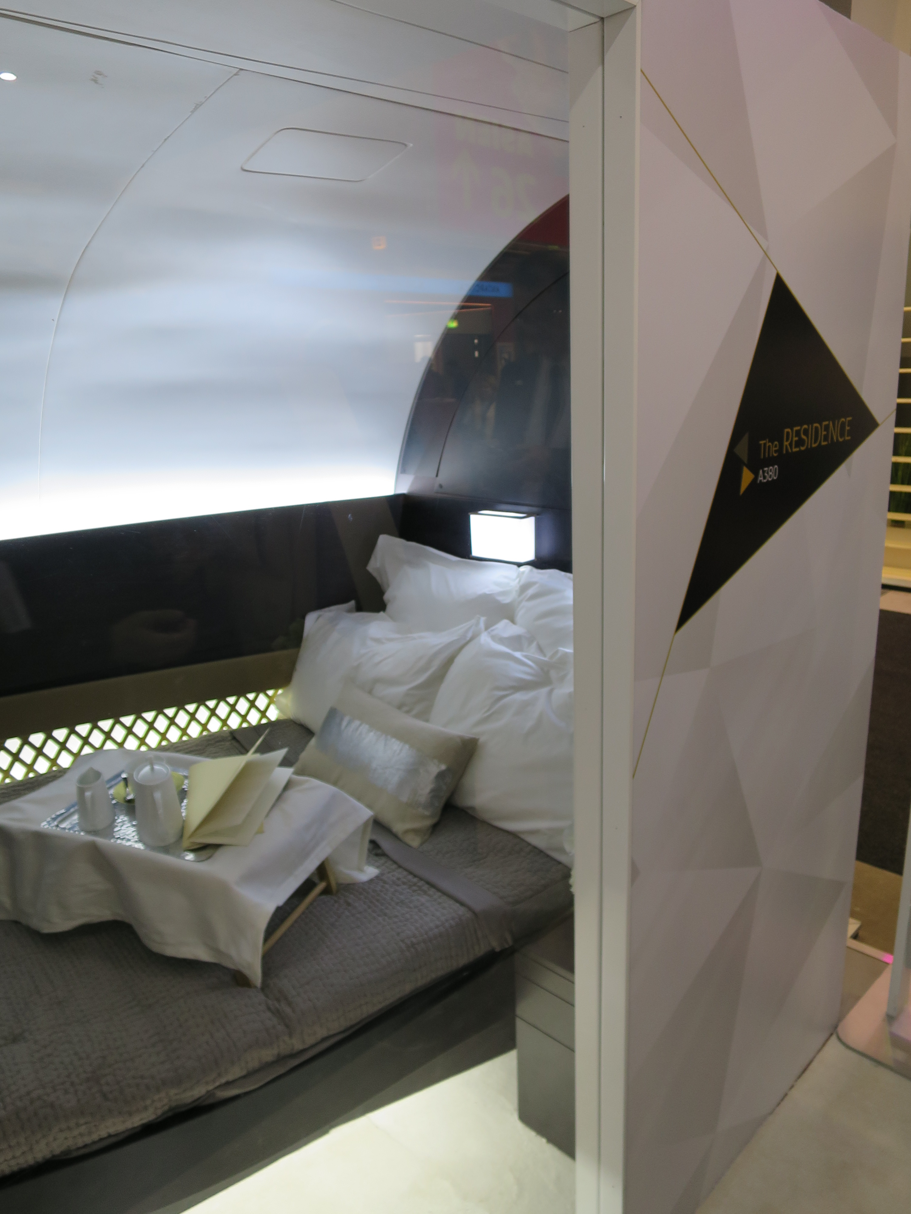 A380 The Residence Apartment Etihad Airways ITB2015